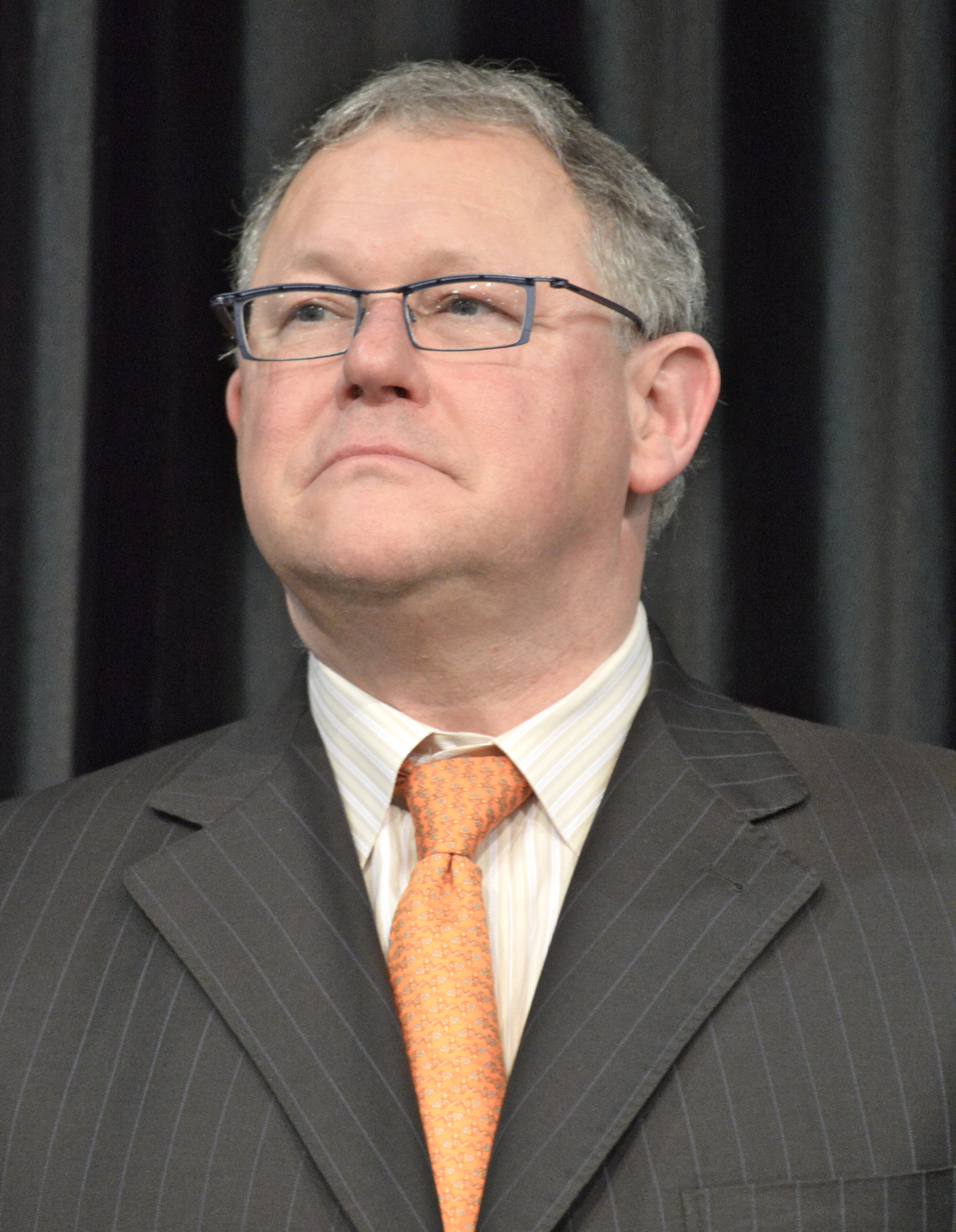 Jacques Chagnon, président de L'Assemblée nationale du Québec, au Salon international du livre de Québec 2013, lors de la remise des prix de l'Assemblée nationale